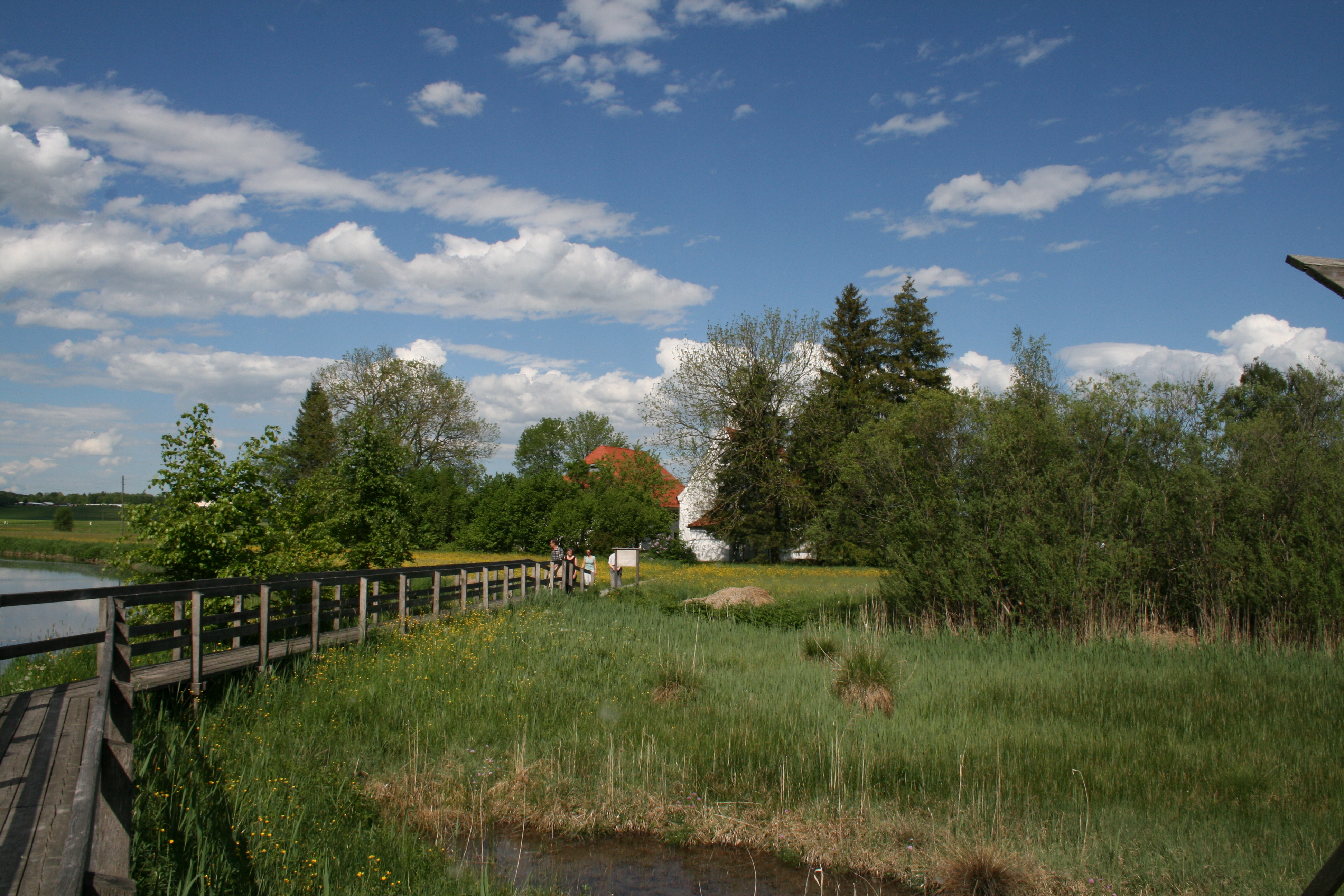 Das Benninger Ried, bei Memmingen